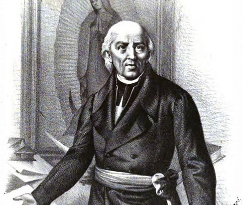 Miguel Hidalgo